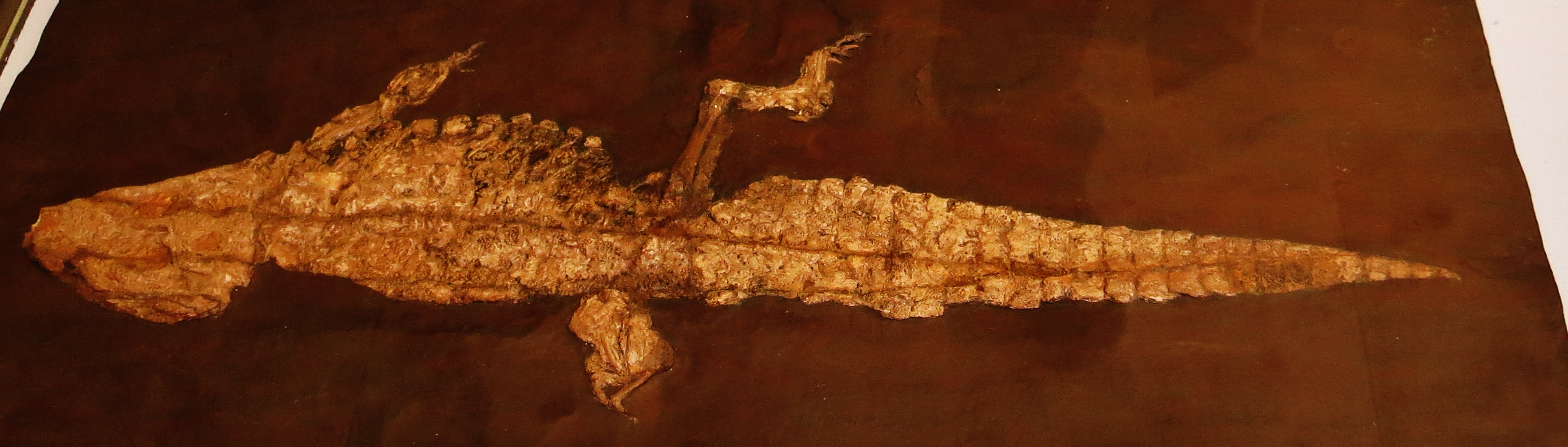 Fossil - Took the picture at Museum of Natural History, Karlsruhe